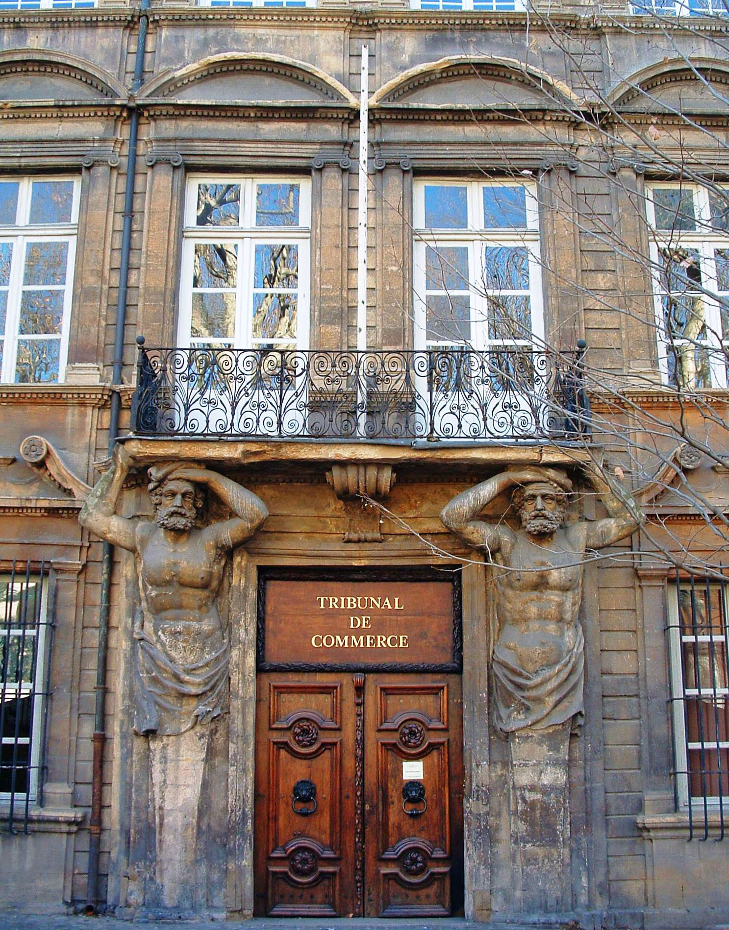 Aix-en-Provence - Hôtel Maurel de Pontevès - Elévation de la façade